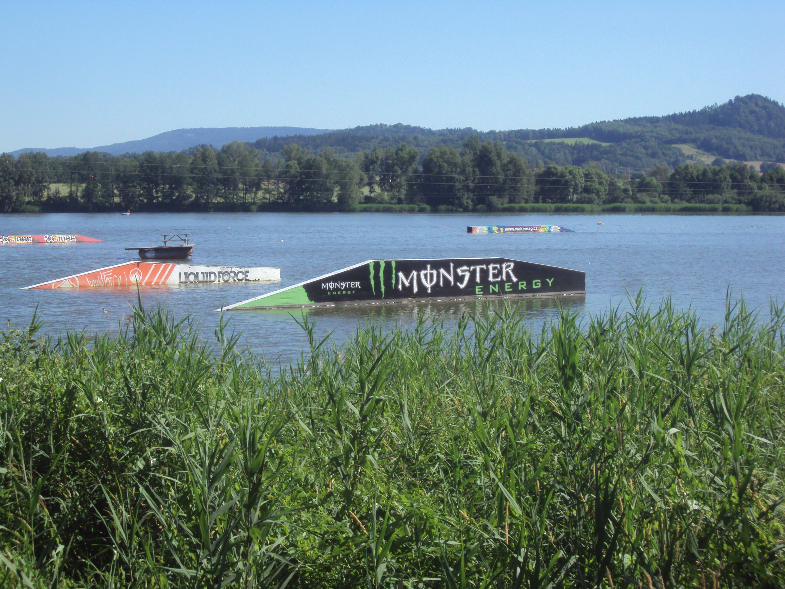 Vodní lyžaři v Stráži pod Ralskem